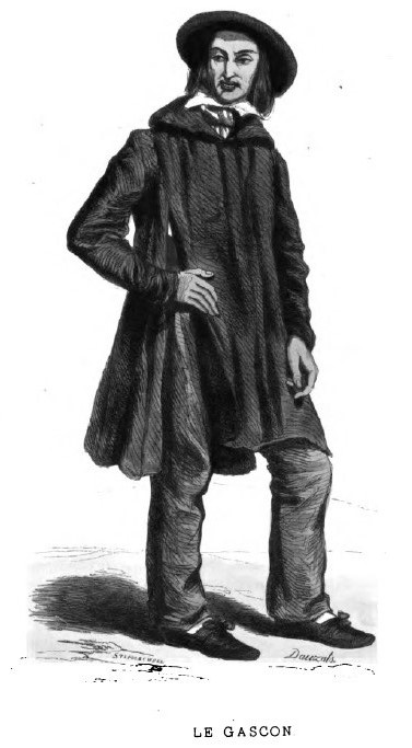 Le Gascon